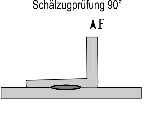 Prüfung von Kleinteilschweißverbindungen: Schälzugprüfung - Winkel 90°